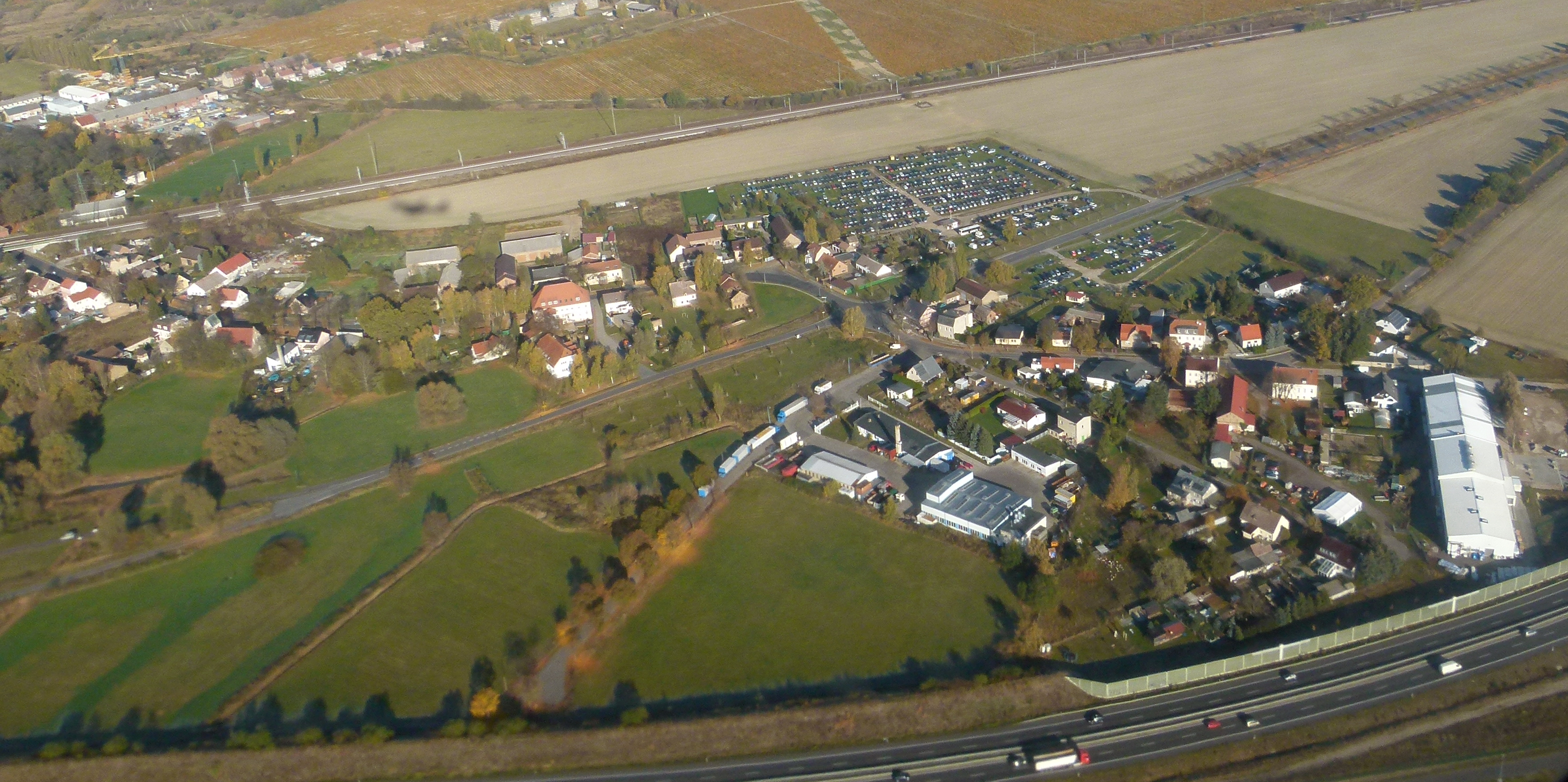 Blick auf Waßmannsdorf